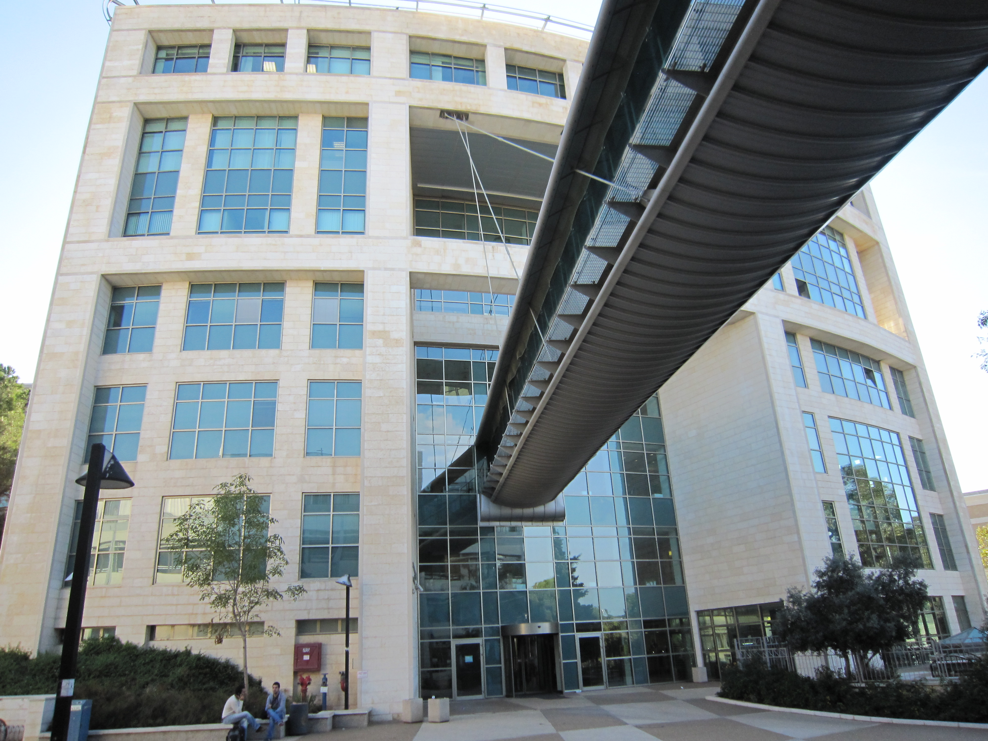 הבניין ע"ש רבין - הפקולטה להנדסה אזרחית וסביבתית בטכניון